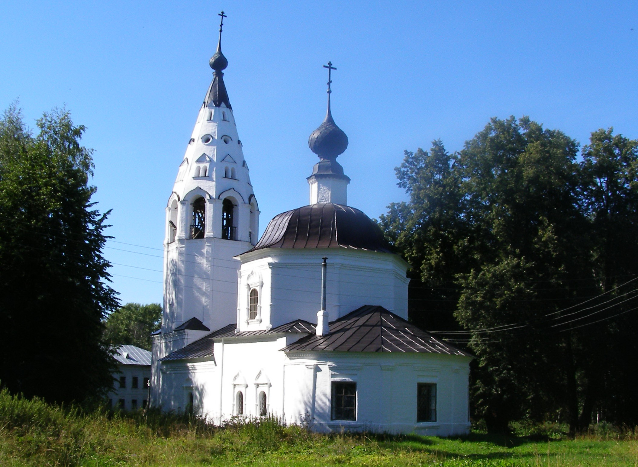 Зимний храм Успенского собора (1699 г.) расположенный в Плёсе на "Соборной горе"